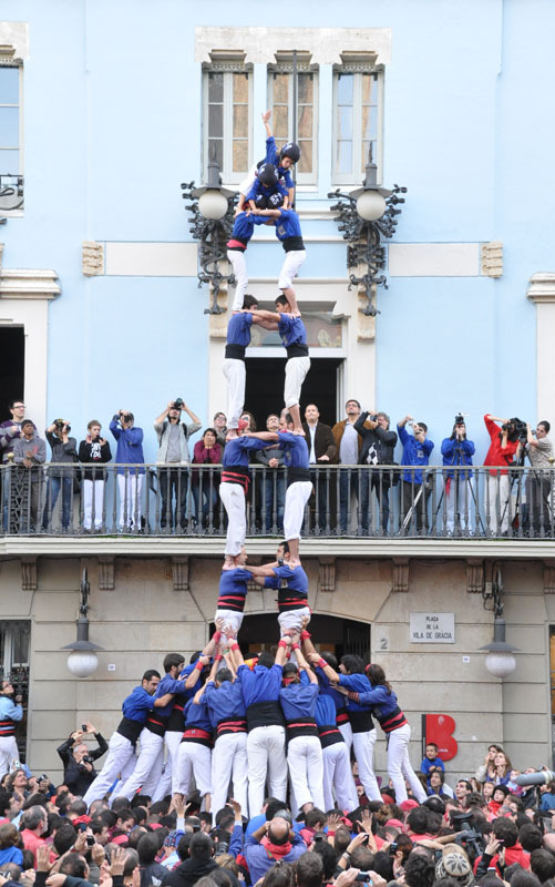 Tercer 2 de 8 amb folre carregat dels Castellers de la Vila de Gràcia el 20 de novembre del 2011 a la Plaça de la Vila de Gràcia.